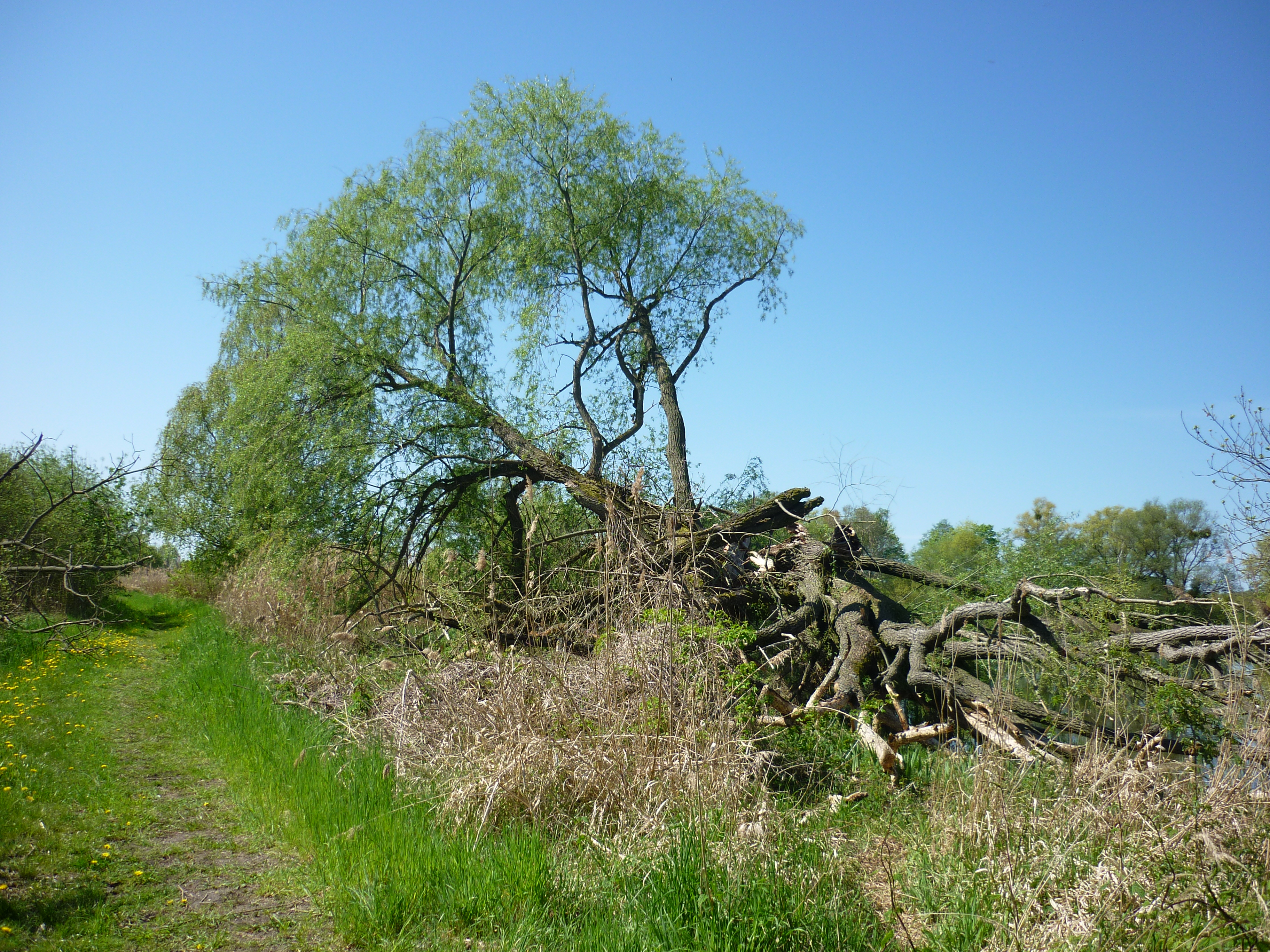 Naturschutzgebiet "Biotopverbund Welsengraben" bei Gransee (Kreis Oberhavel).